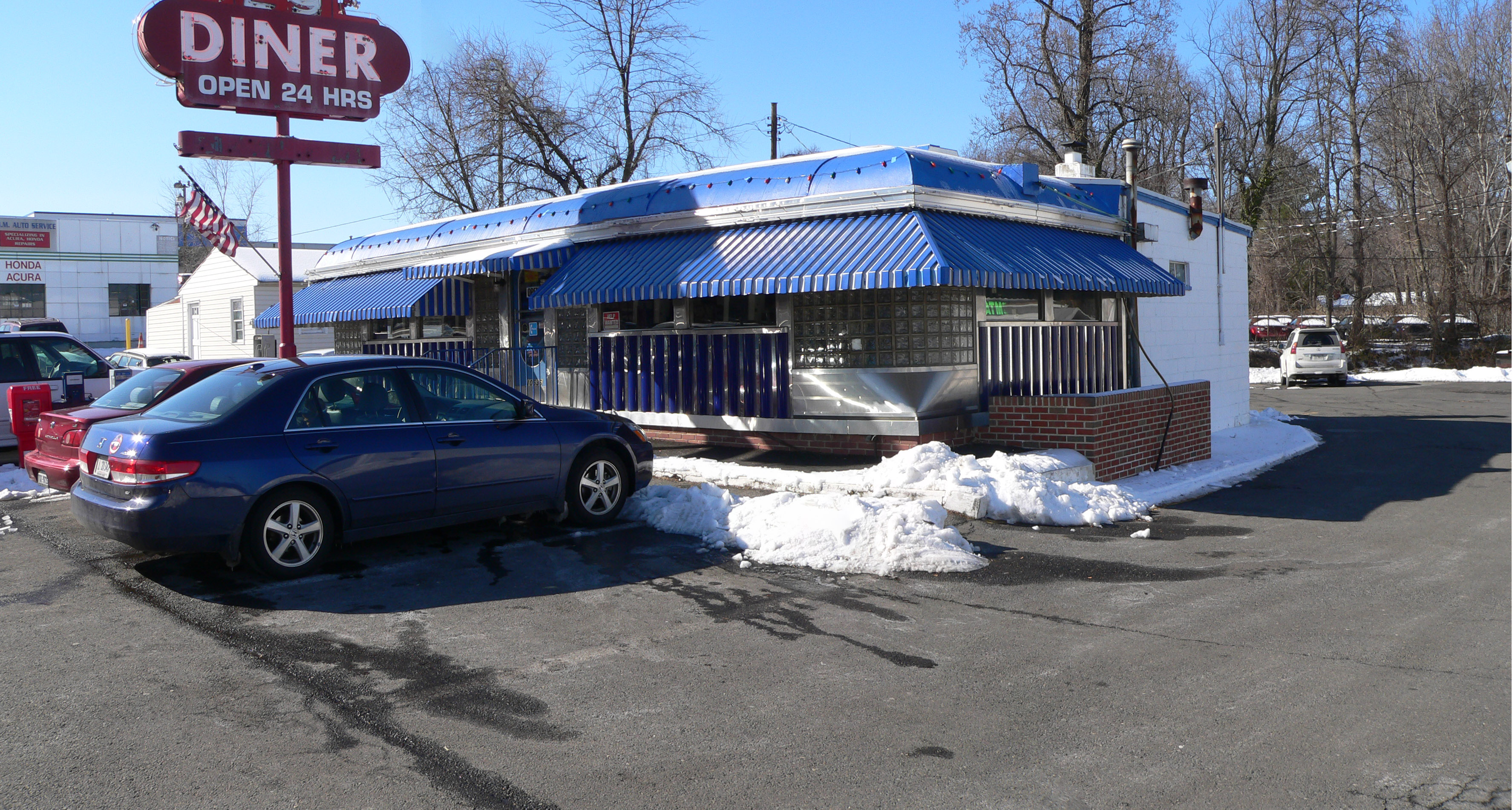 29 Diner, Fairfax, Virginia